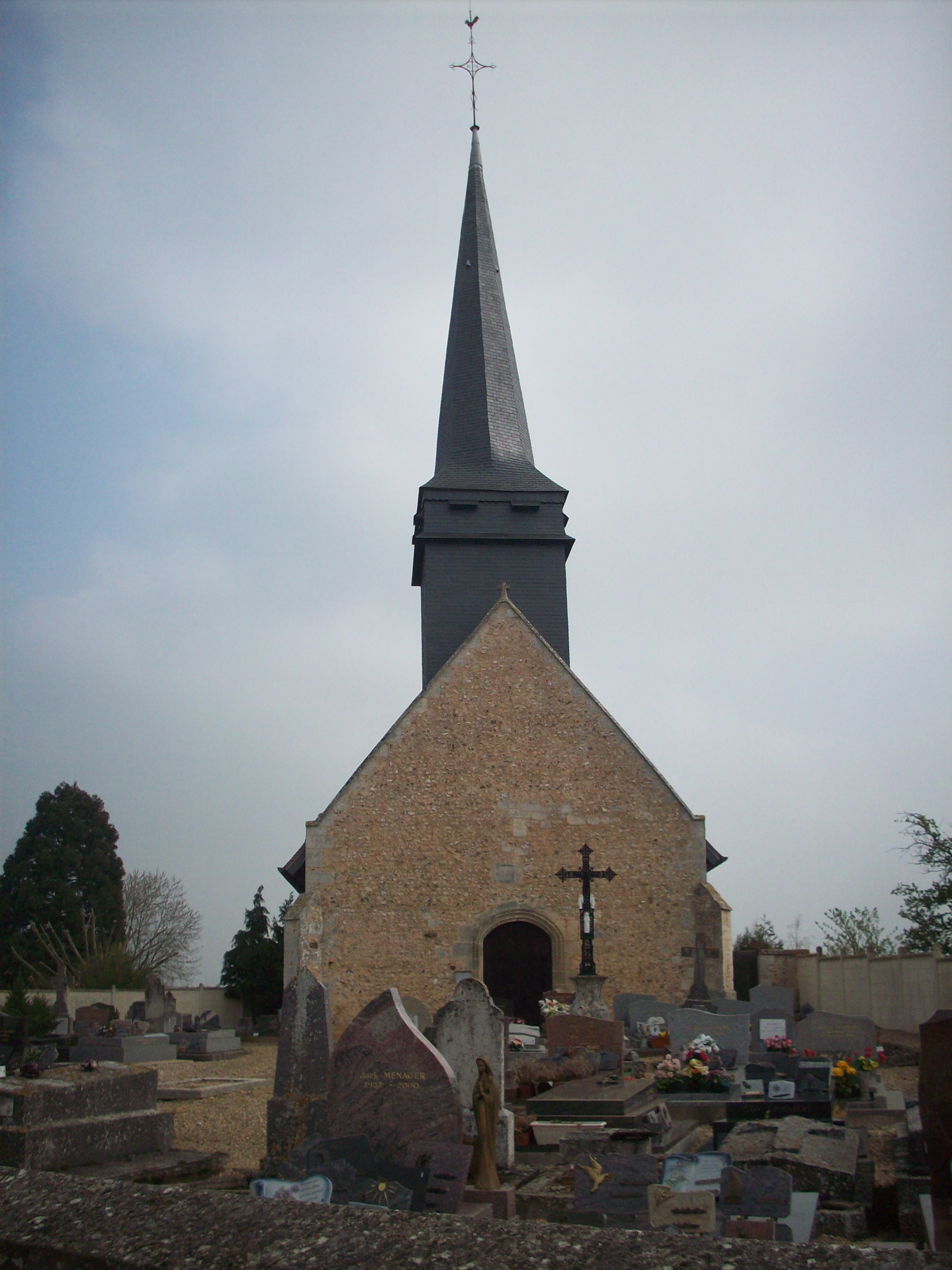 Église Saint-Martin de Moisville.